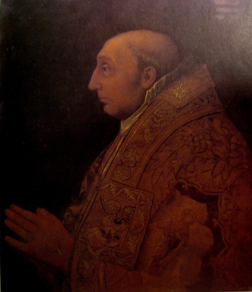 Pope Alexander VI